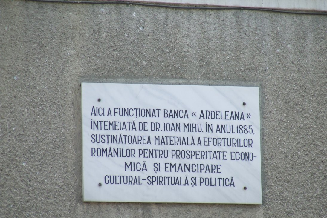 Image from Orăştie, Romania - Ardeleana Bank House - detail